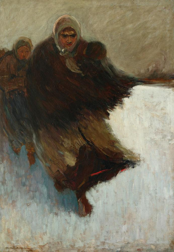 Marin H. Georgescu - Refugiaţii, ulei pe pânză, 128,4x85 cm, semnat şi datat stânga jos, cu brun, M. H. Georgescu, 1914.